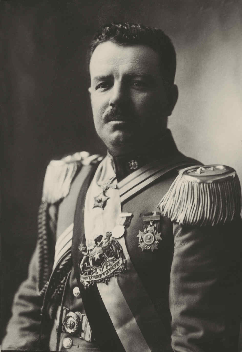 General chileno Carlos Ibáñez del Campo en su primera presidencia.